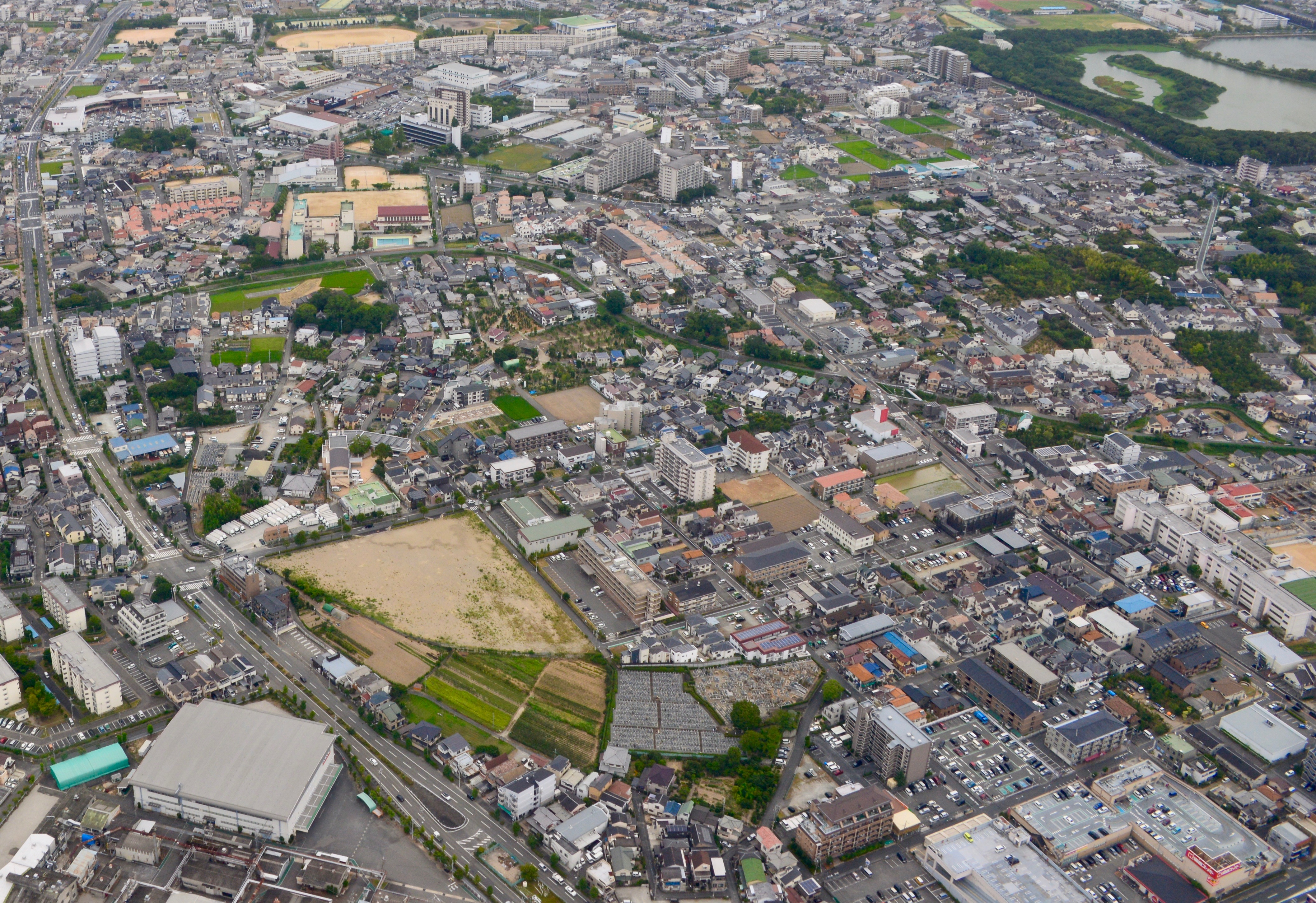 伊丹市中野地区。伊丹空港へ着陸する機内より撮影